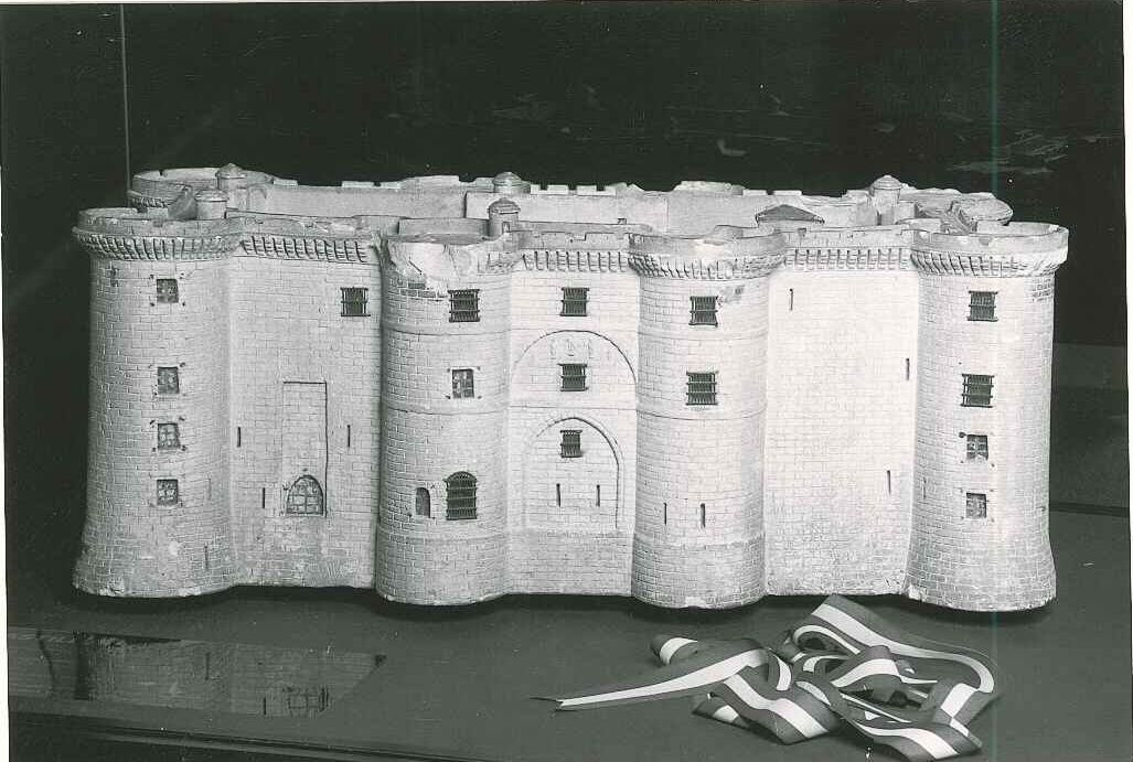 Selon les pierres sculptées au moment de sa destruction.